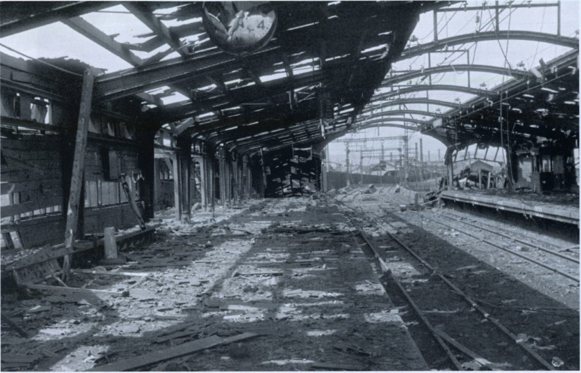 昭和20年7月24日の第7回大阪大空襲を受け壊滅した森ノ宮駅の構内。